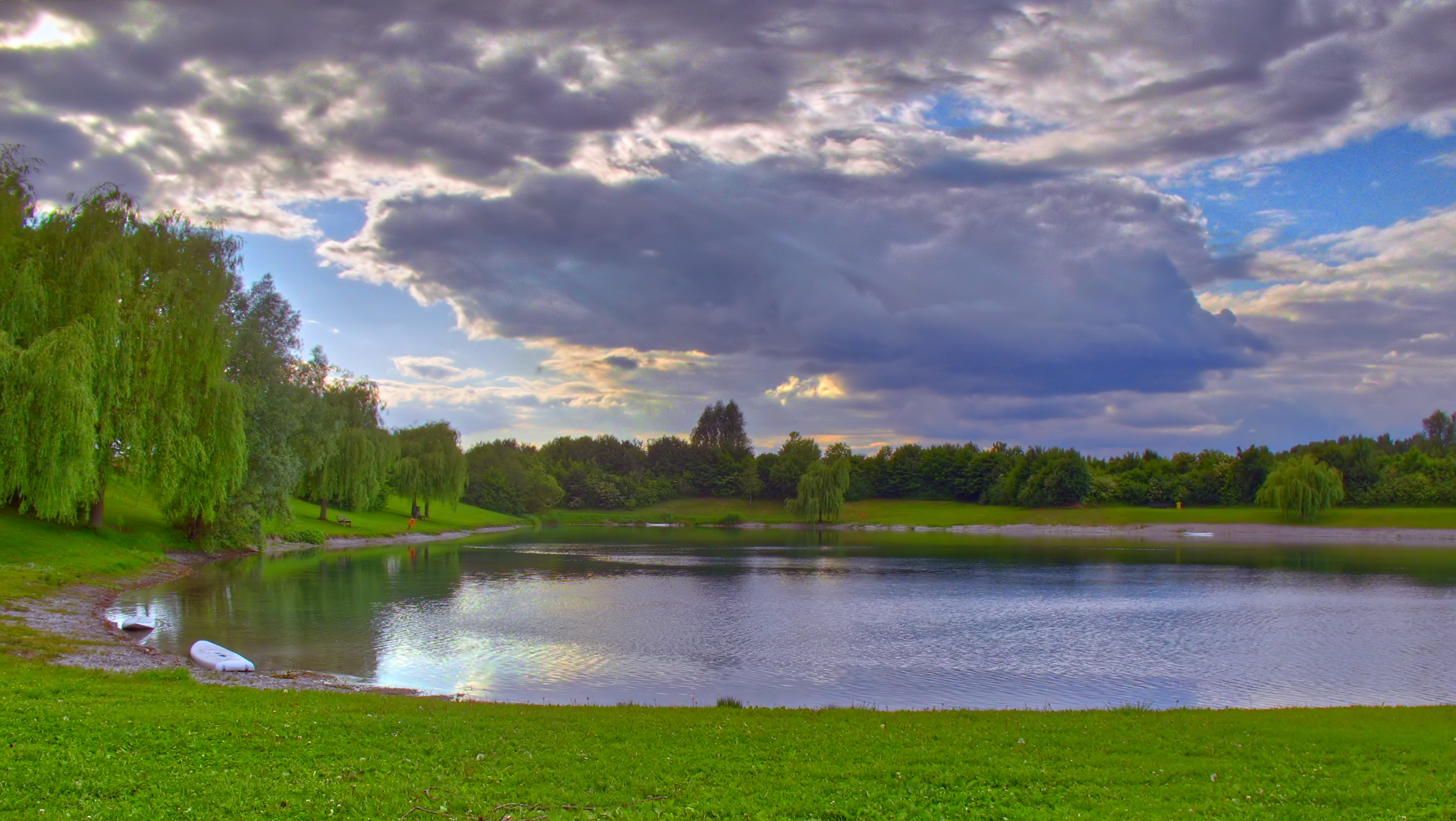 Deutschland, Bayern, Fürstenfeldbruck, Emmering, Emmeringer See